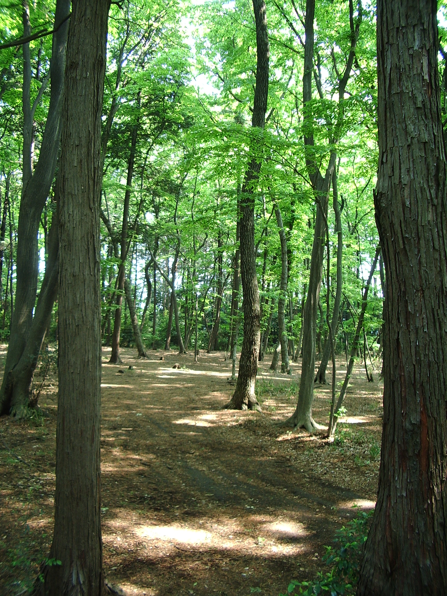 Woods of Musashino, Niiza, Saitama, Japan